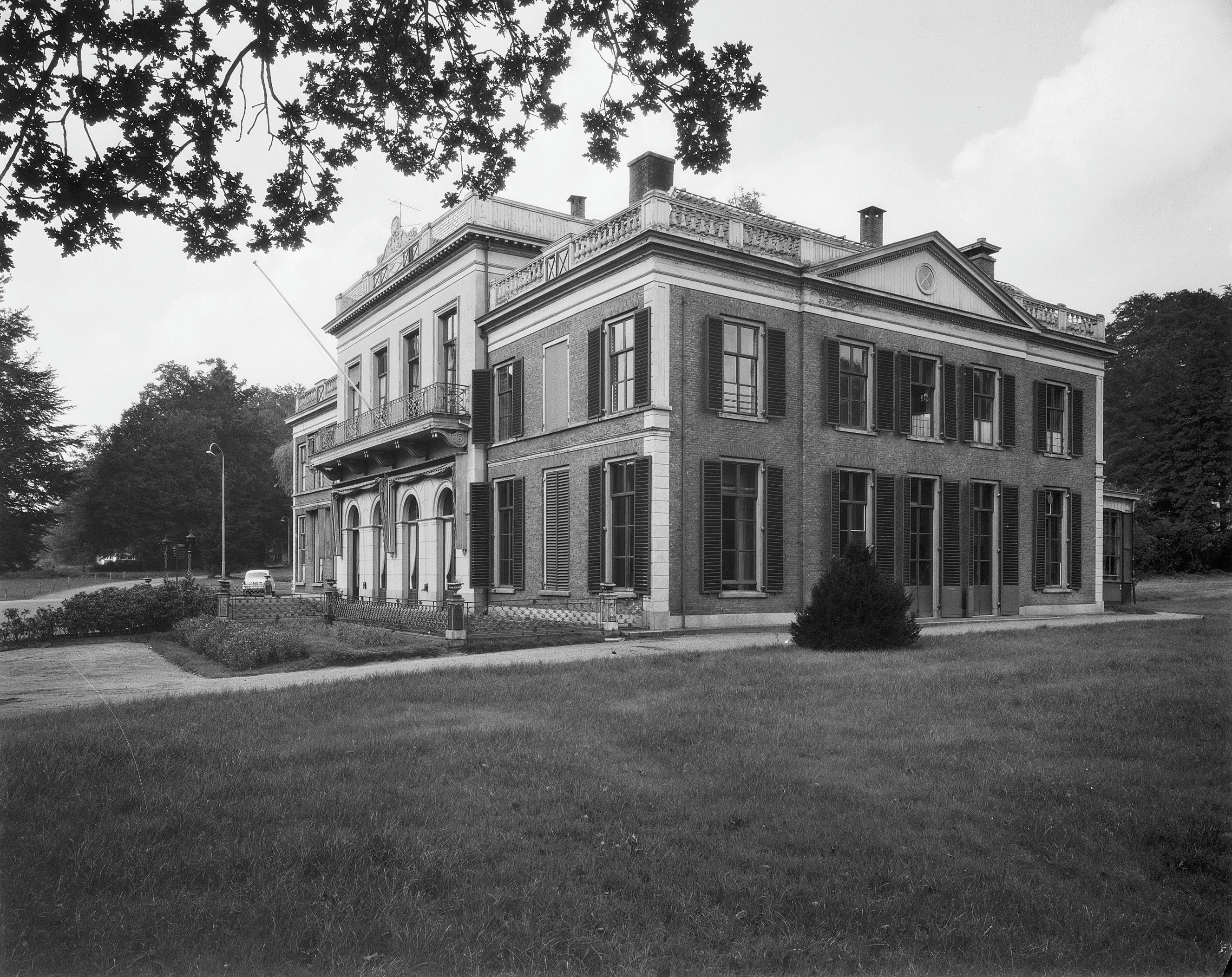 Rennenenk: Overzicht